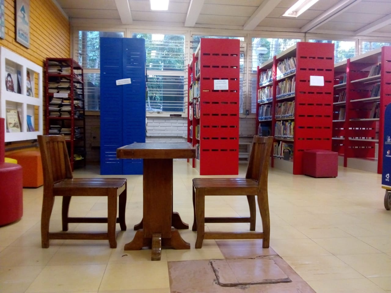 Biblioteca modelo do laboratório. Na imagem mobiliário adequado para uso de crianças.